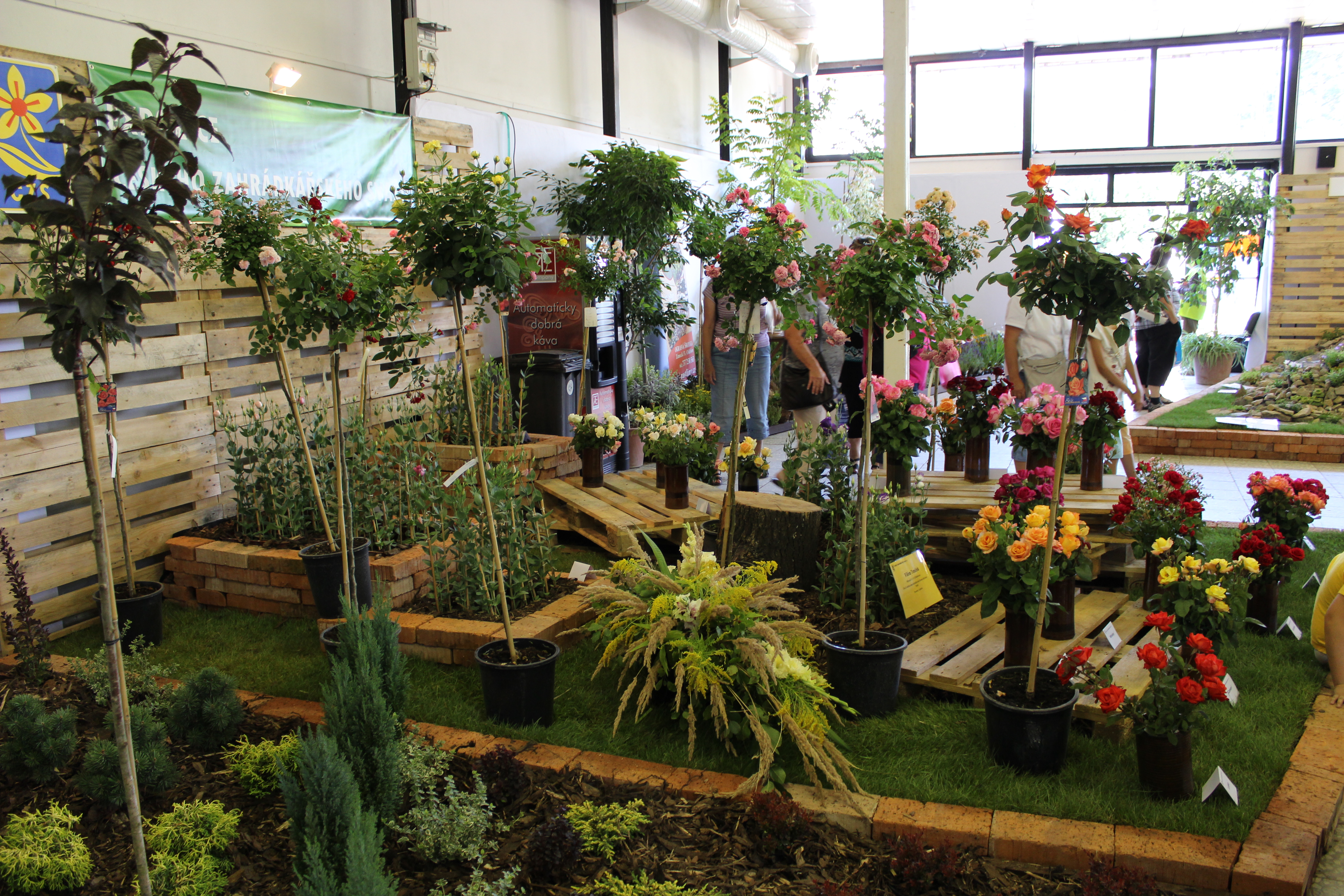 Vnitřní expozice rostlin na výstavě Flora Olomouc 2013.